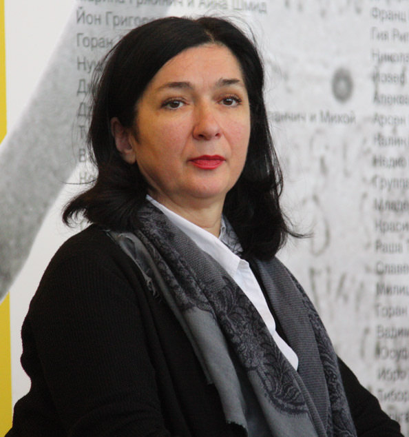 Slovenian curator. Moscow, 2015